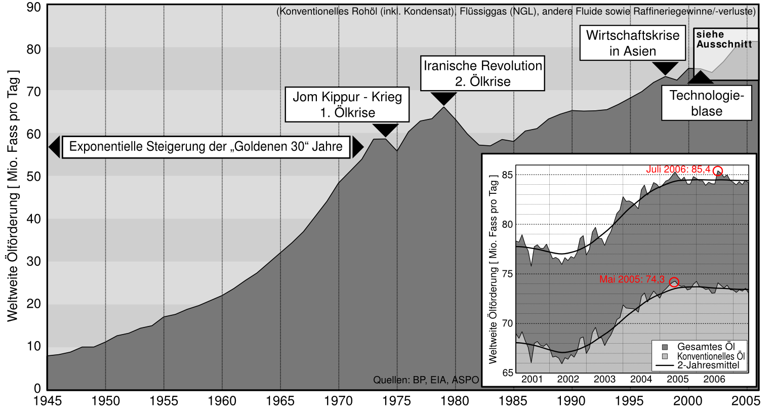 Weltweite Erdölproduktion zwischen Januar 2001 und Januar 2007